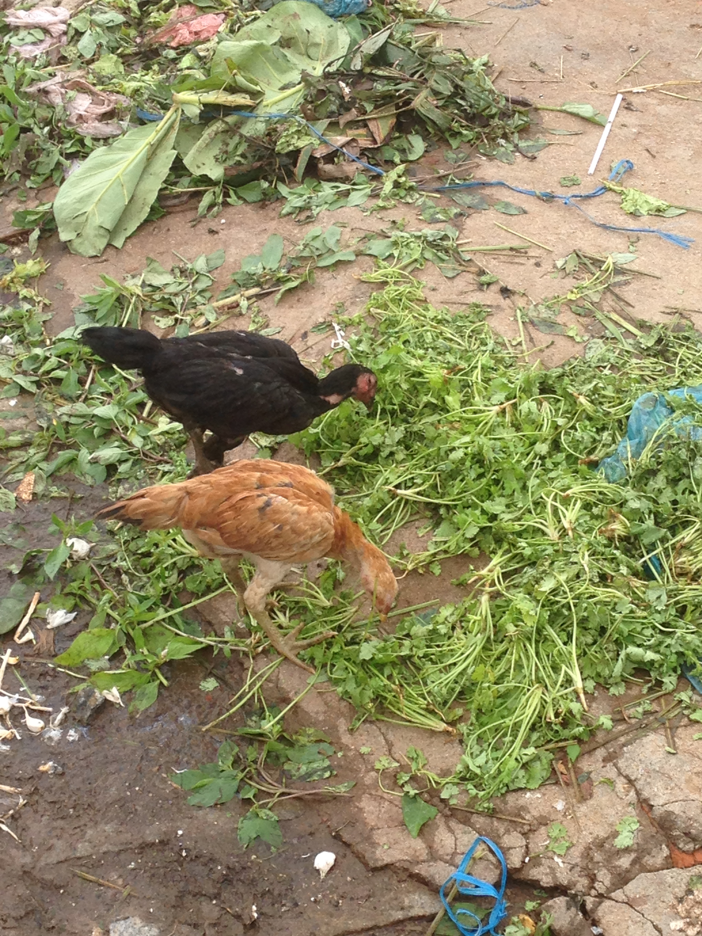 Kokinoj. Quang Ngai, Vjetnamio.